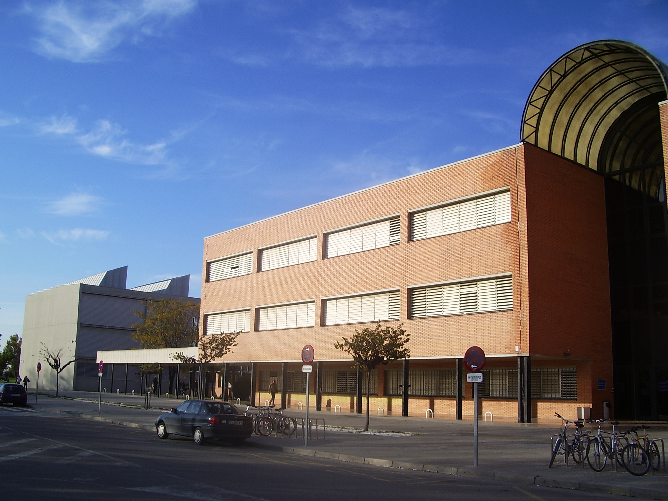 Centro Politécnico Superior from Zaragoza, Spain